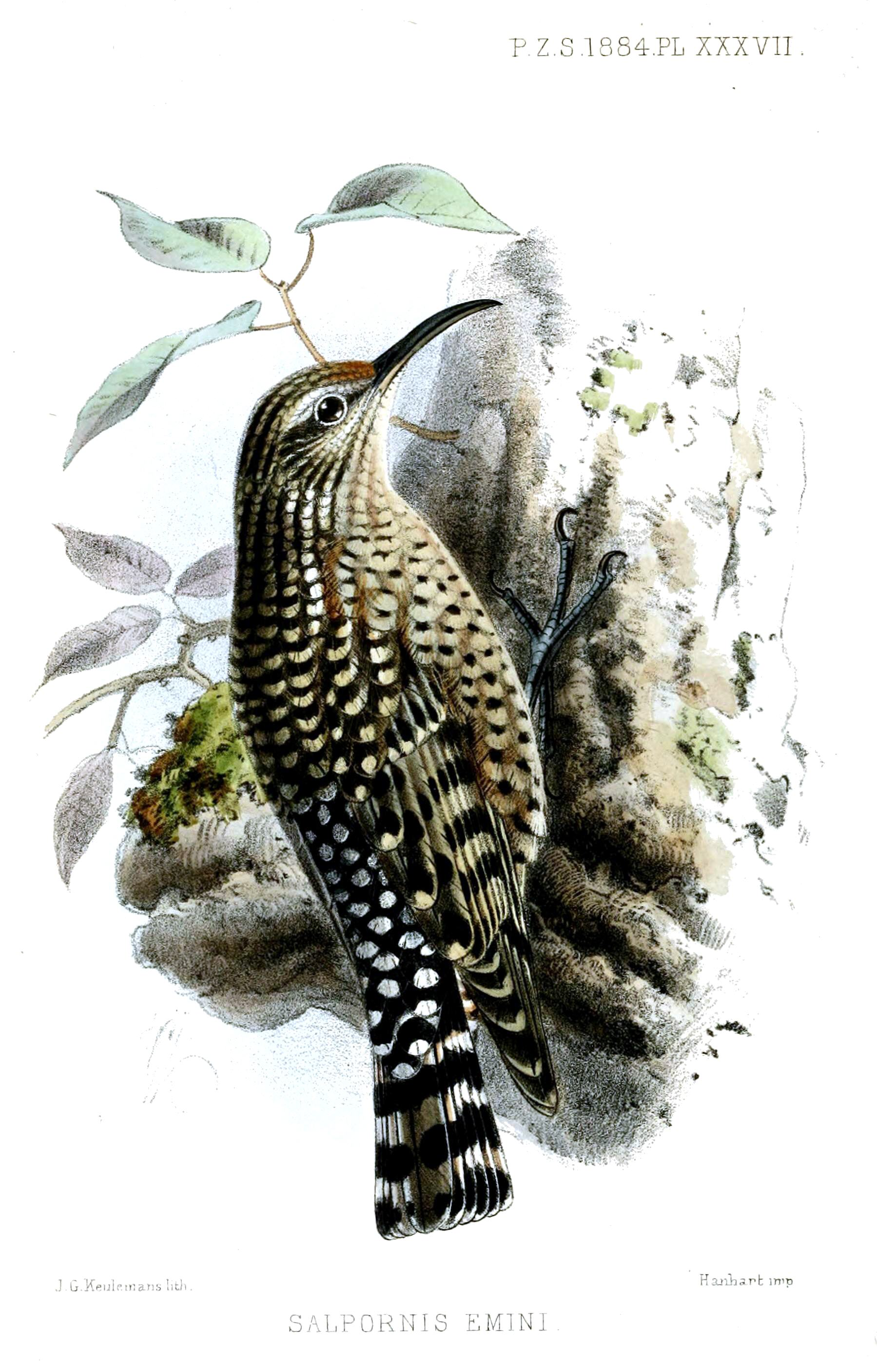 Salpornis salvadori emini